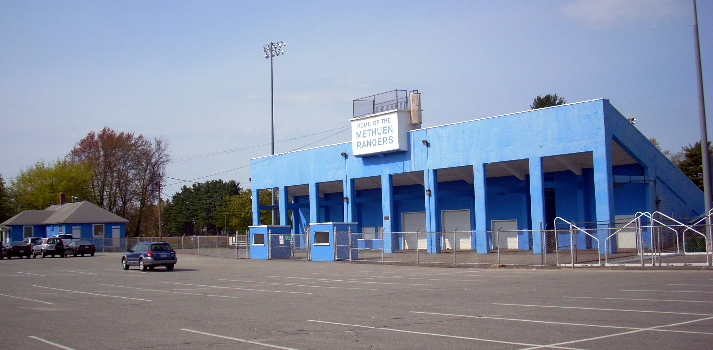 Nicholson Stadium & Field Pleasant View Street, Methuen Massachusetts